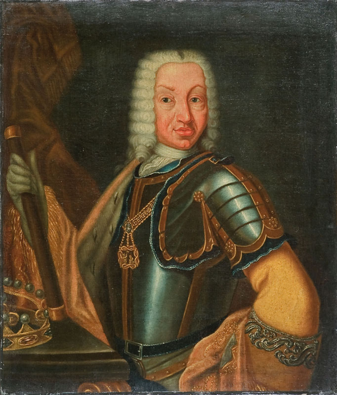 Ritratto di Carlo Emanuele III di Savoia (1701-1773)